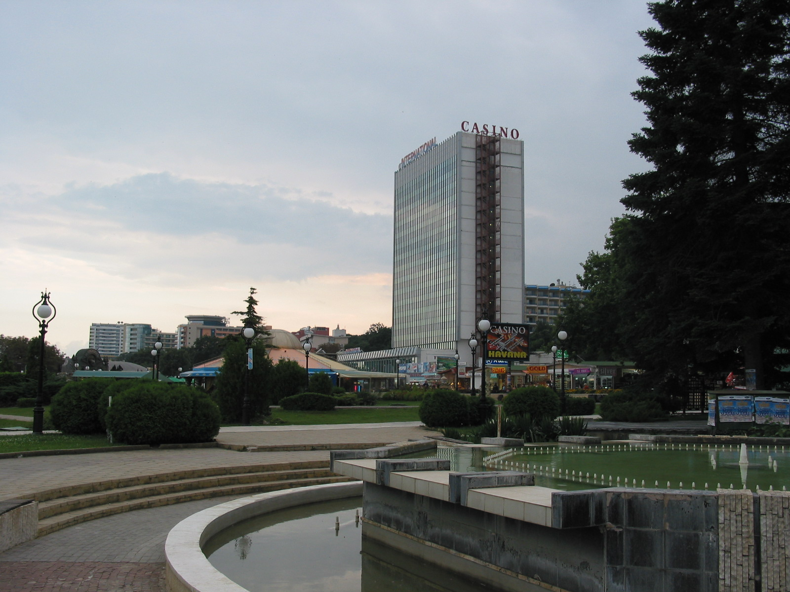 de: Goldstrand (Златни пясъци), Hotel International en: Golden Sands, hotel International